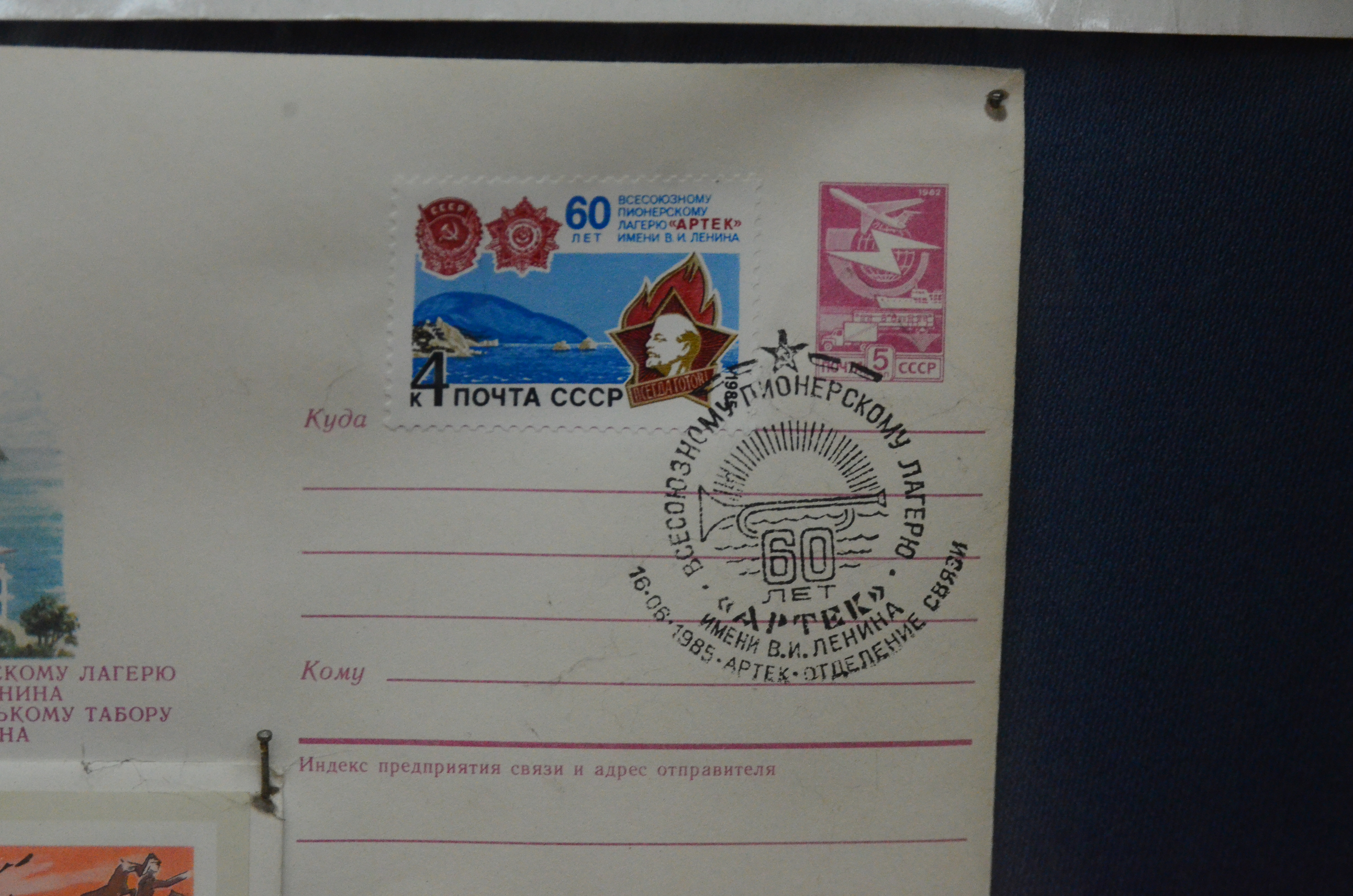 Музей историии и развития Донецкой железной дороги